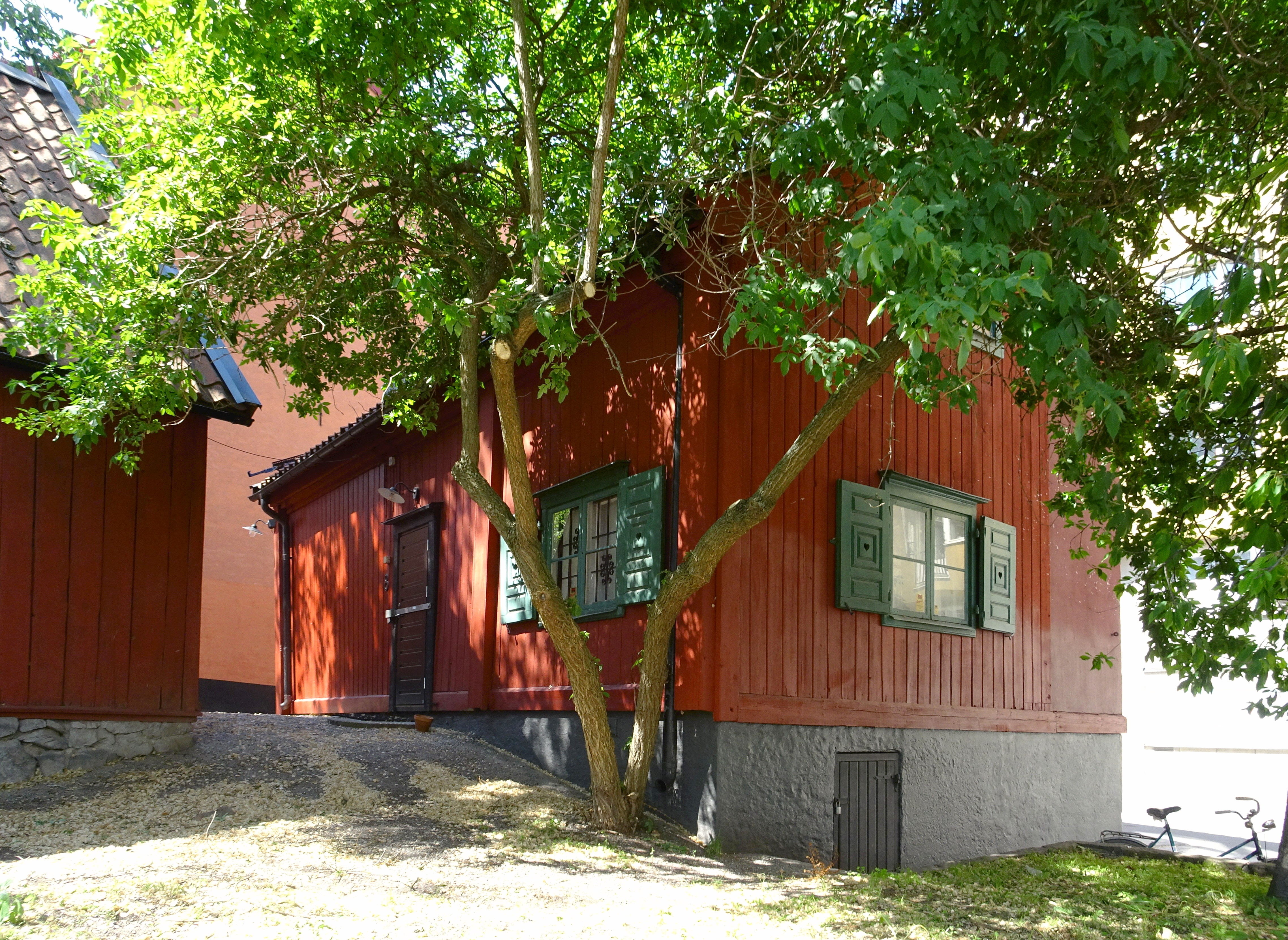 Trähus i kvarteret Dundercrantz, Kapellgränd 8